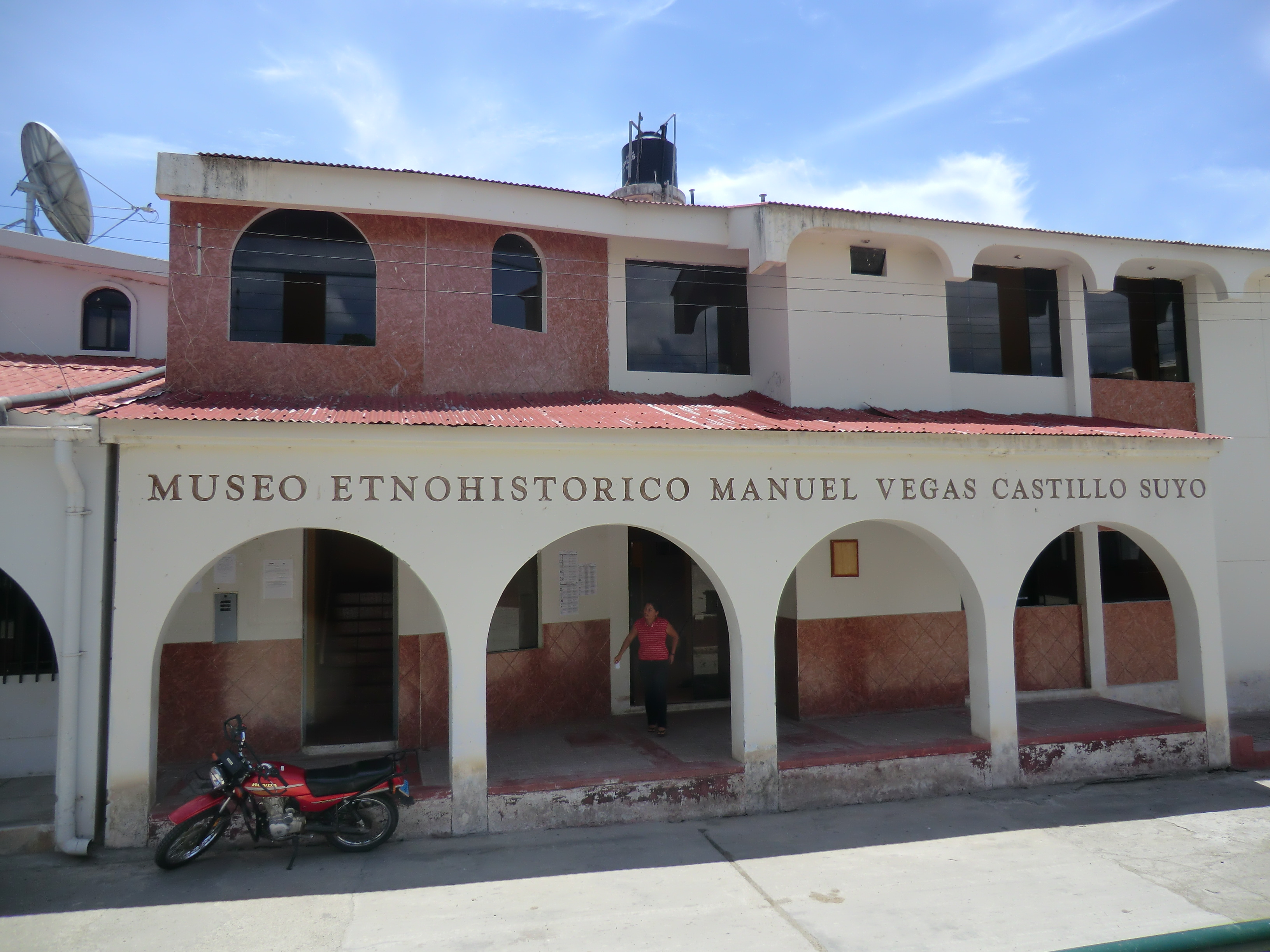 Museo Etnohistorico Manuel Vegas Castillo Suyo